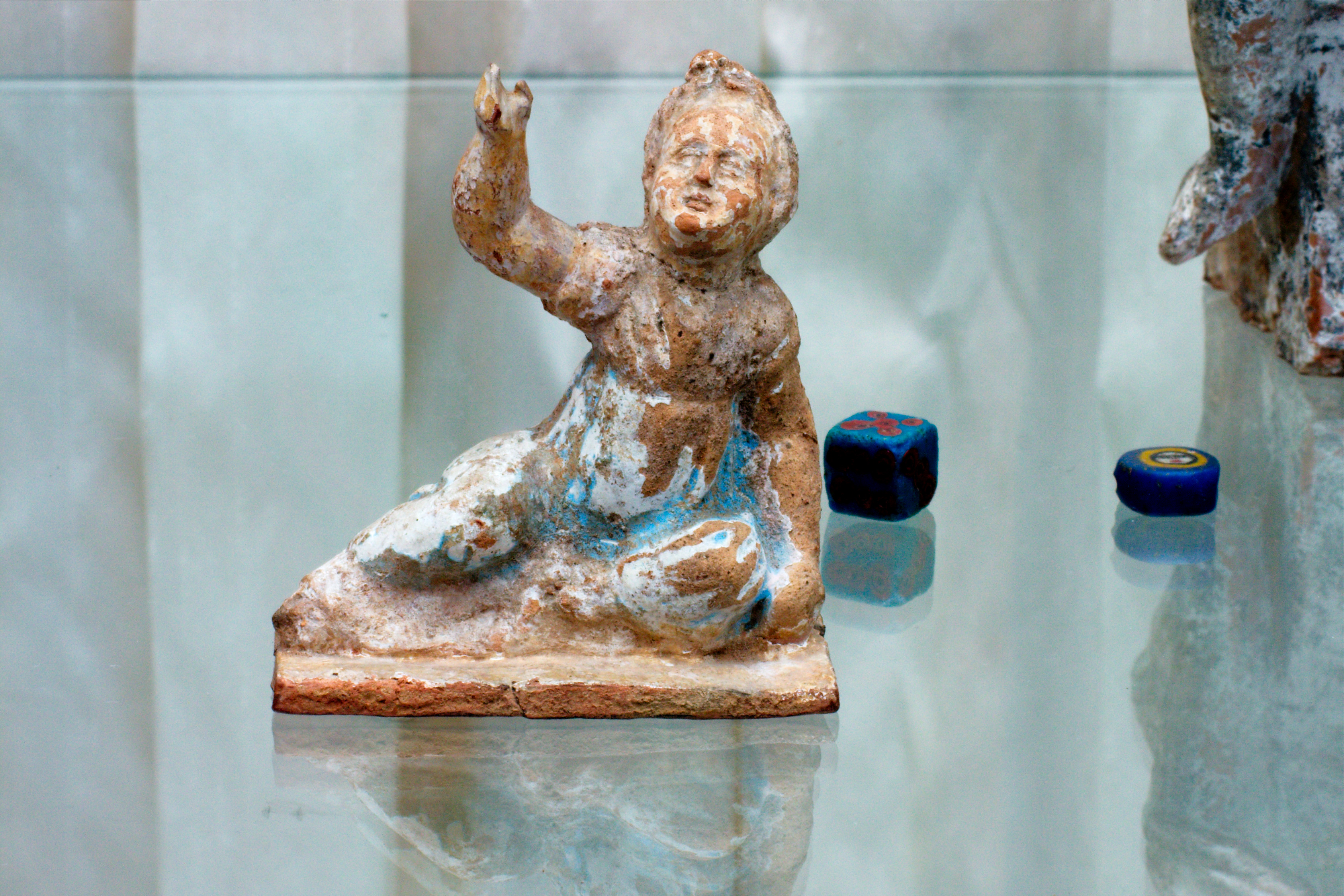 Griechische Terrakottastatue